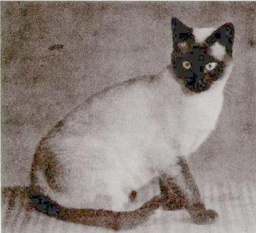 uno dei primi siamesi importati dall'Asia